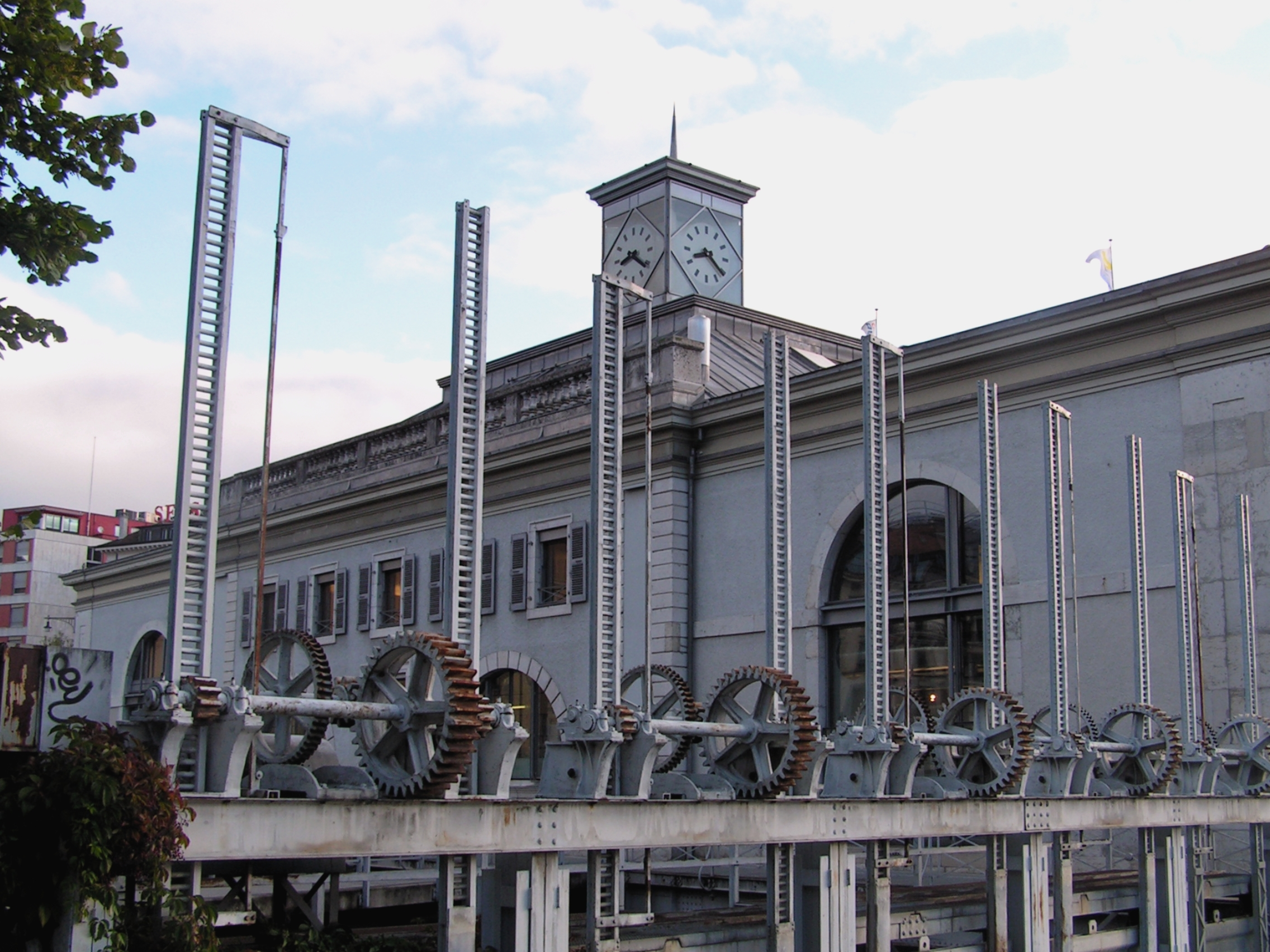 Pont de la Machine 1, Genève. Le pont de la Machine.